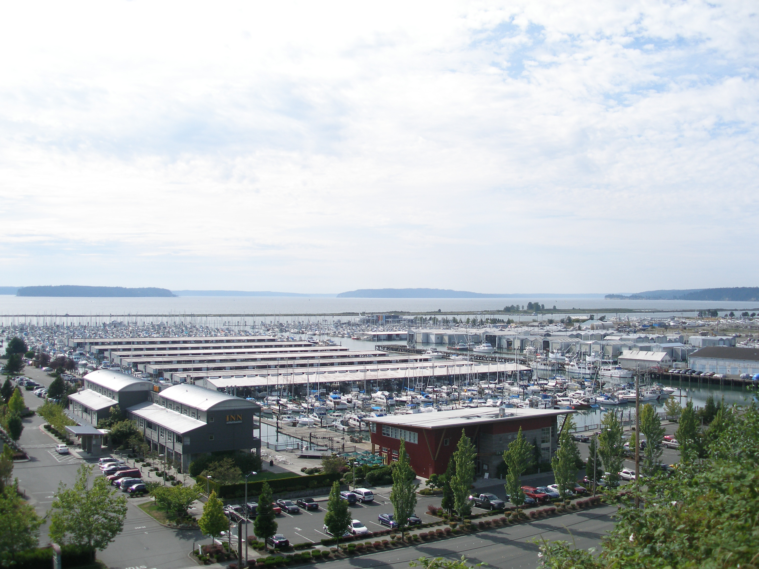 Everett Marina as viewed from Grand Ave. Park, Everett, WA.